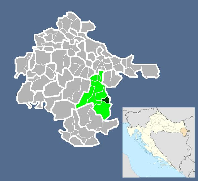 Српски (ћирилица): Насеље Апшевци у Општини Нијемци.